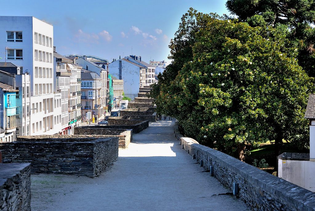 promenade au dessus du rempart romain